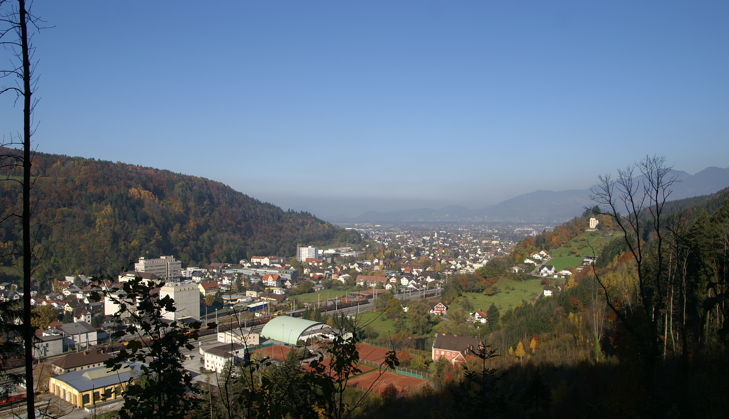 Blick von der Göfiser Strasse auf die Ortsteile Levis und Altenstadt von Feldkirch, in Vorarlberg.